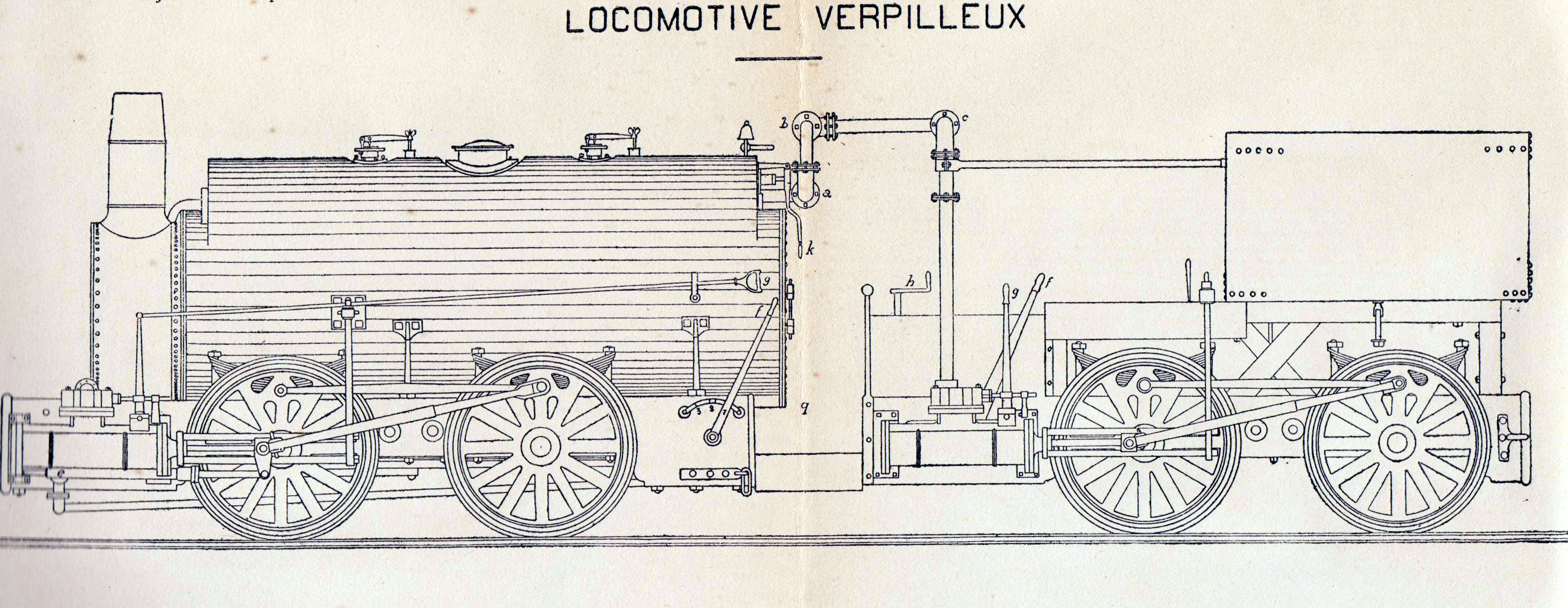 schéma d'une locomotive Verpilleux